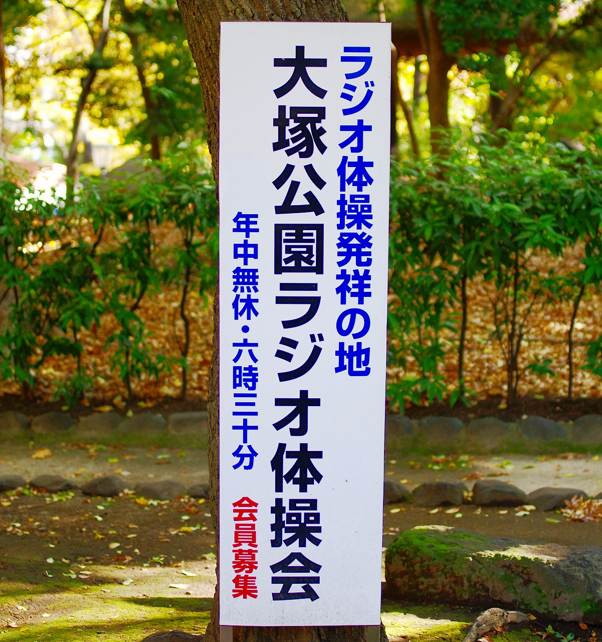 ラジオ体操の発祥の地の看板